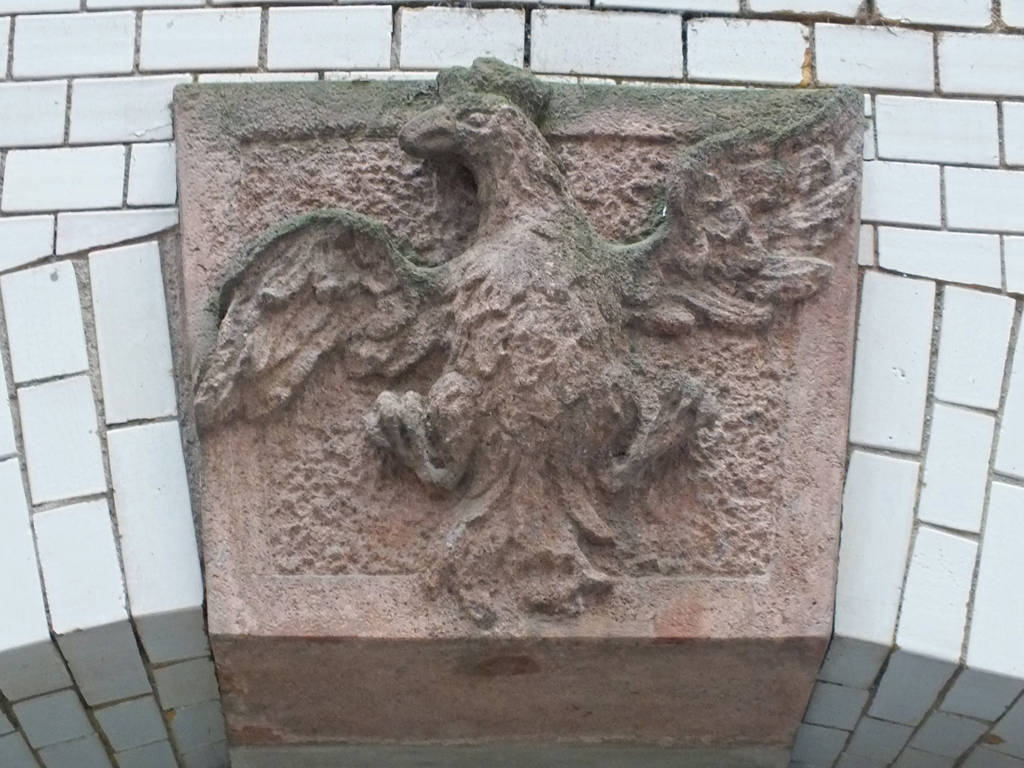 Das alte Hauszeichen der Adler-Apotheke Leipzig, jetzt am Hinterhaus